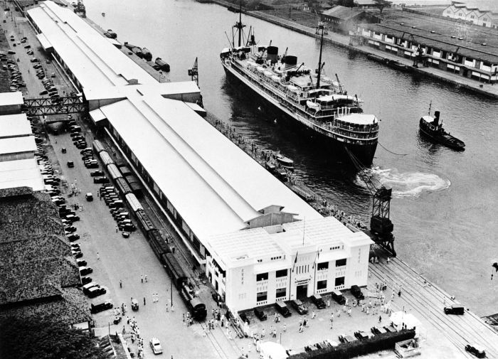 Repronegatief. Een schip van de Stoomvaart Mij Nederland verlaat de haven van Tandjoengpriok, Batavia, Java